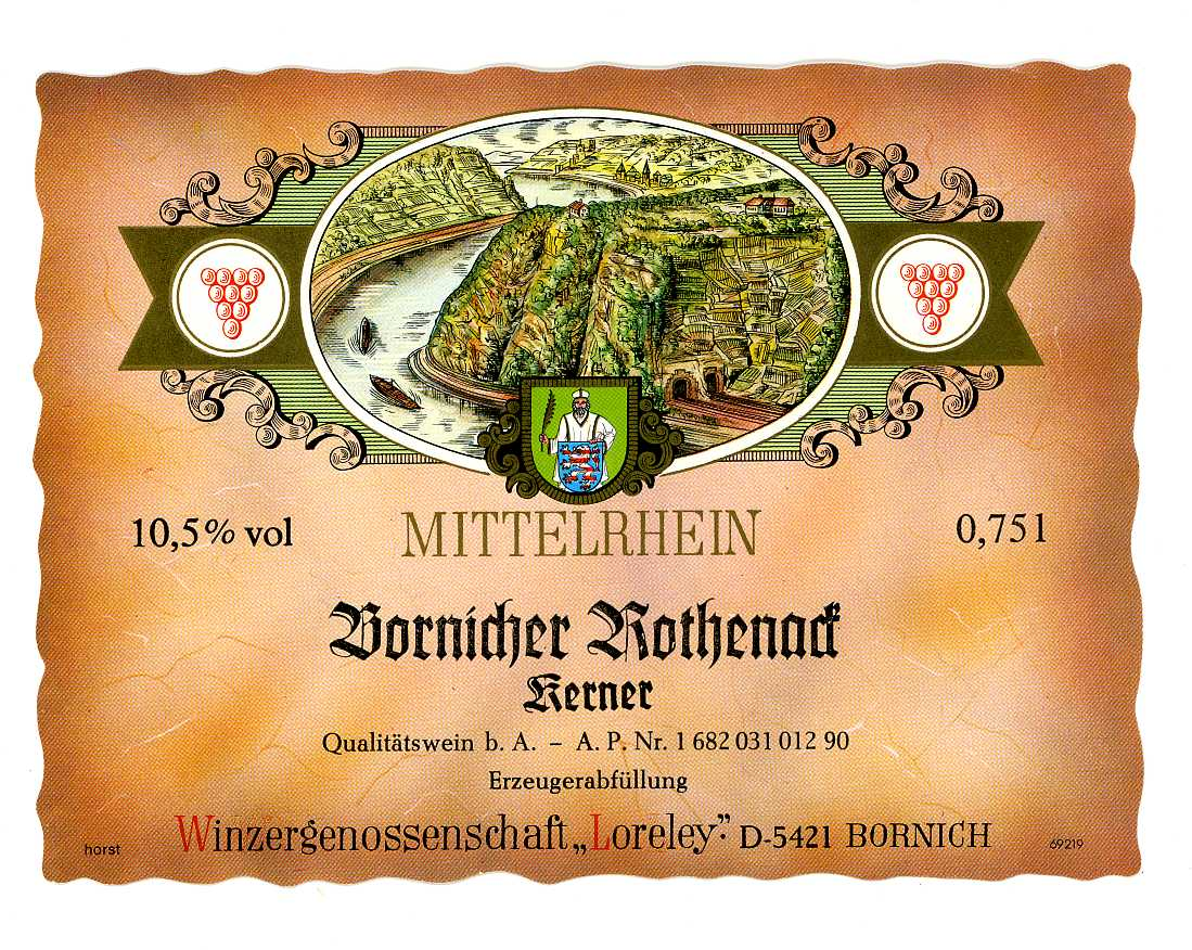 Etiquette de la cuvée 1989, Bornicher Rothenack Winzergenossenschaft Bornich. Belle image de Loreley et de ses tunnels.